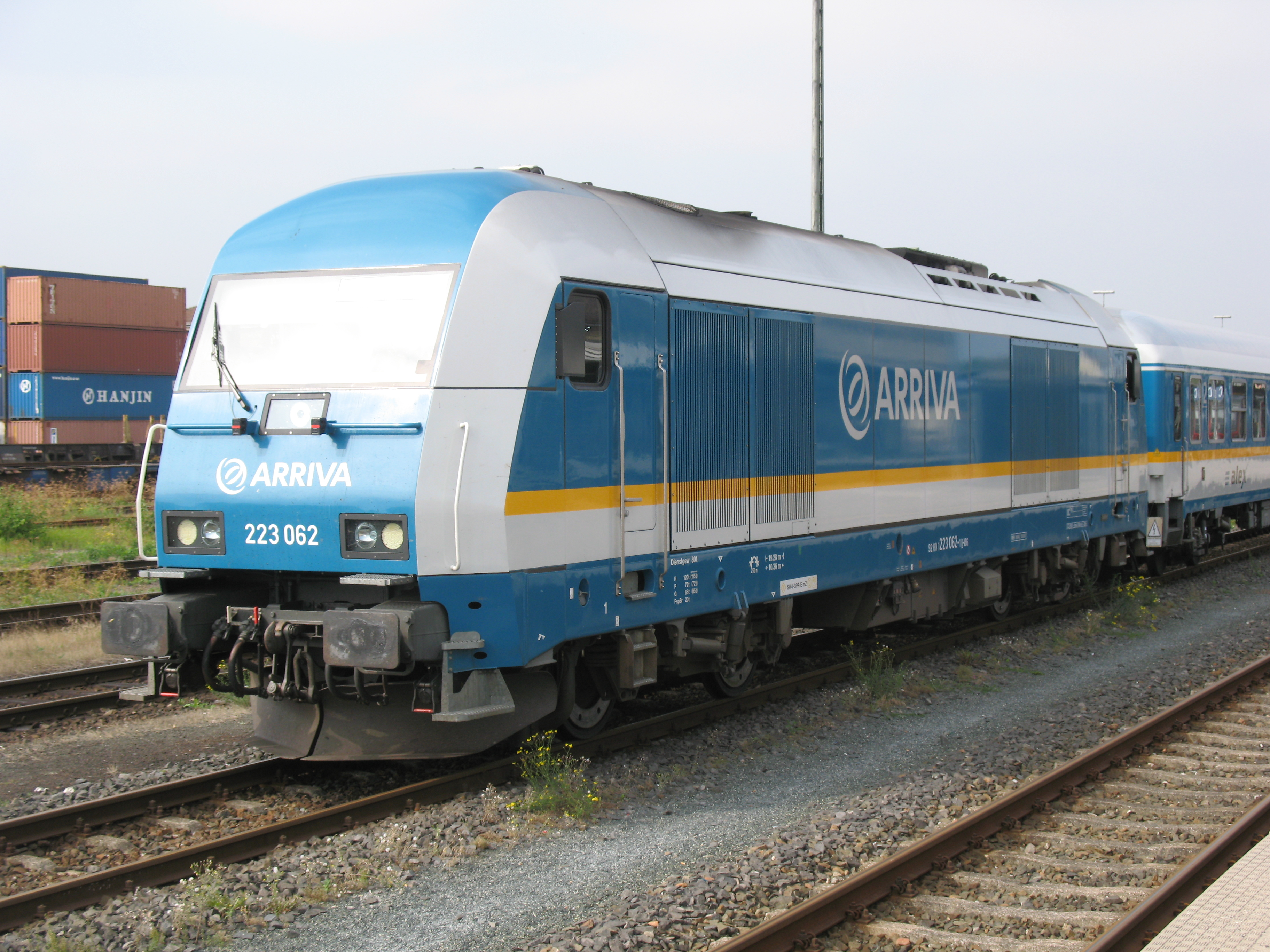 ER20 der Vogtlandbahn für den ALEX